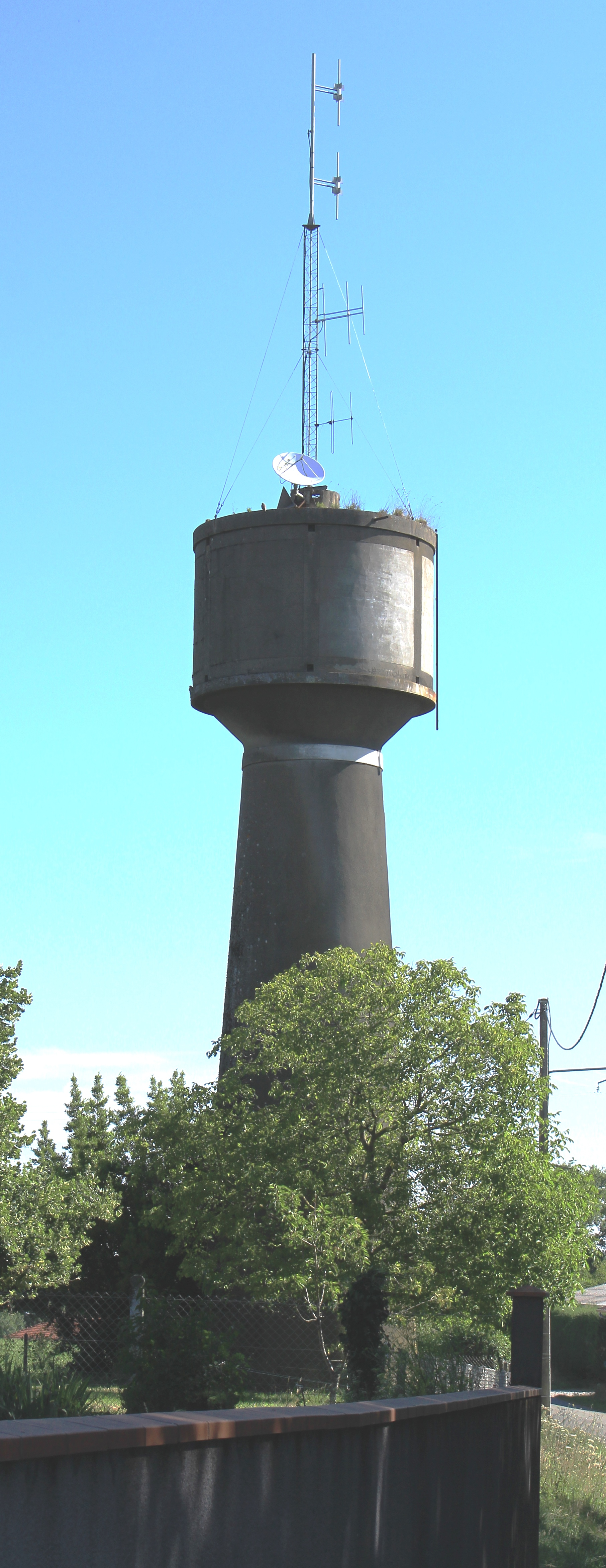 Château d'eau de Campistrous (Hautes-Pyrénées)